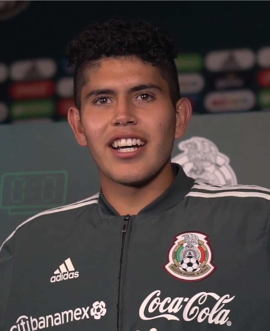 Carlos Vargas en 2018.